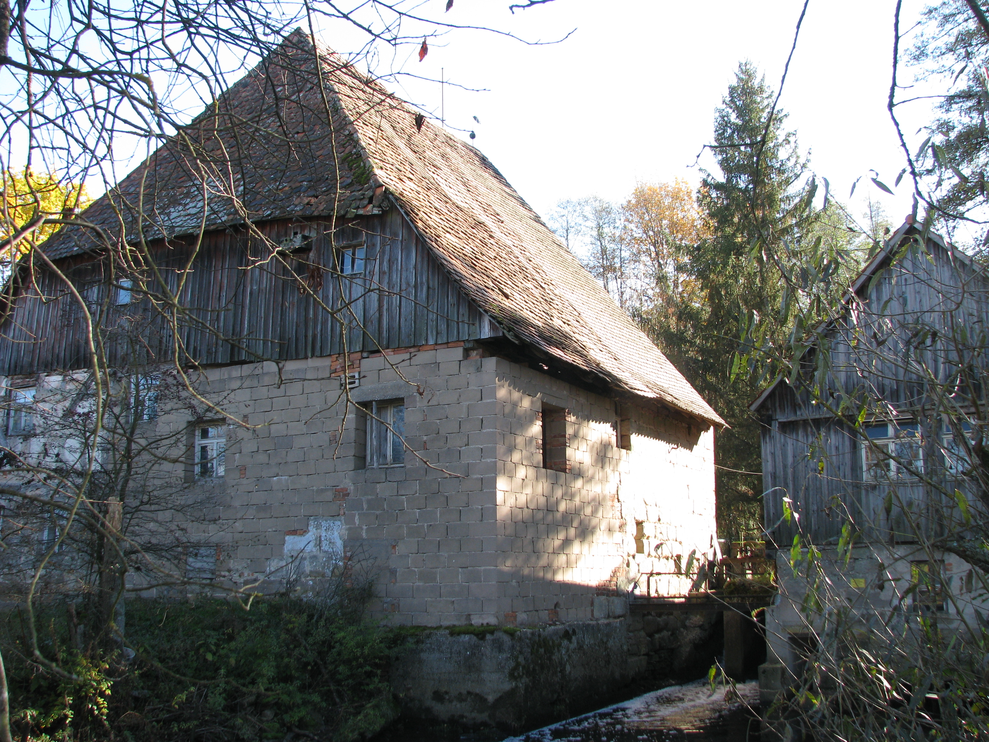 Paulusmühle, Ortsteil von Hilpoltstein im mittelfränkischen Landkreis Roth (Bayern)